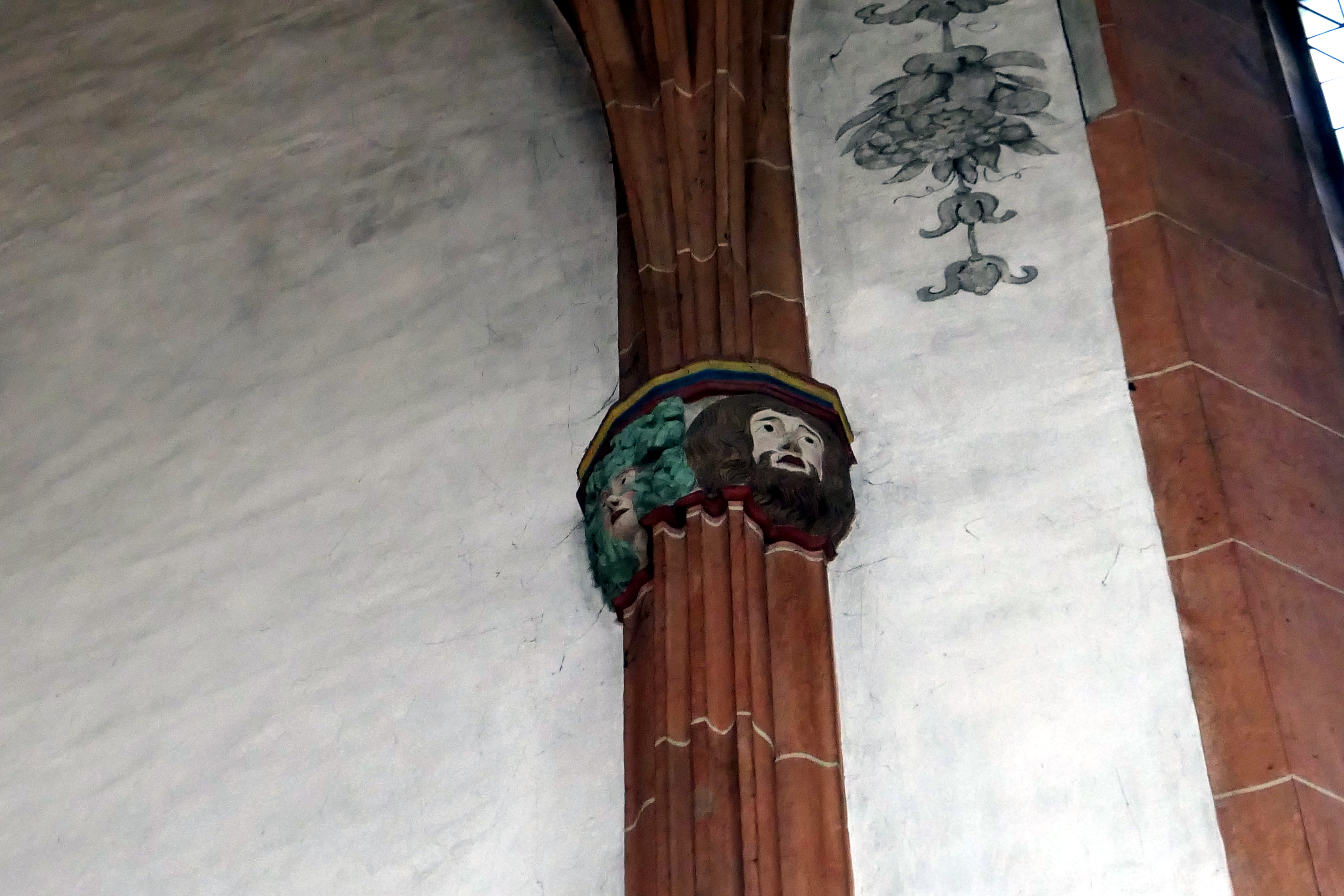 Kapitell mit Blattmaske Chor (Green man) und bärtigem